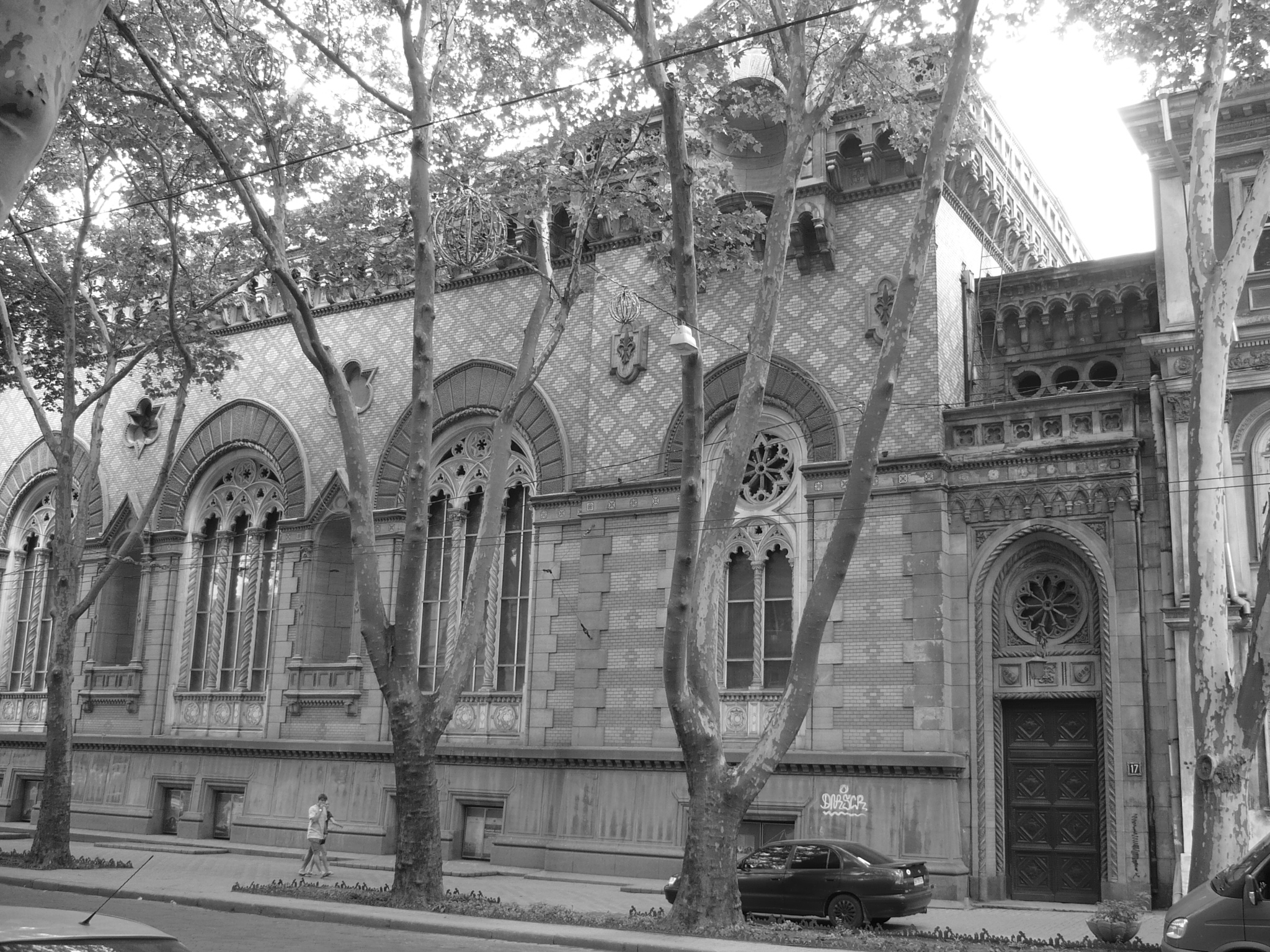 Filharmonia, bok